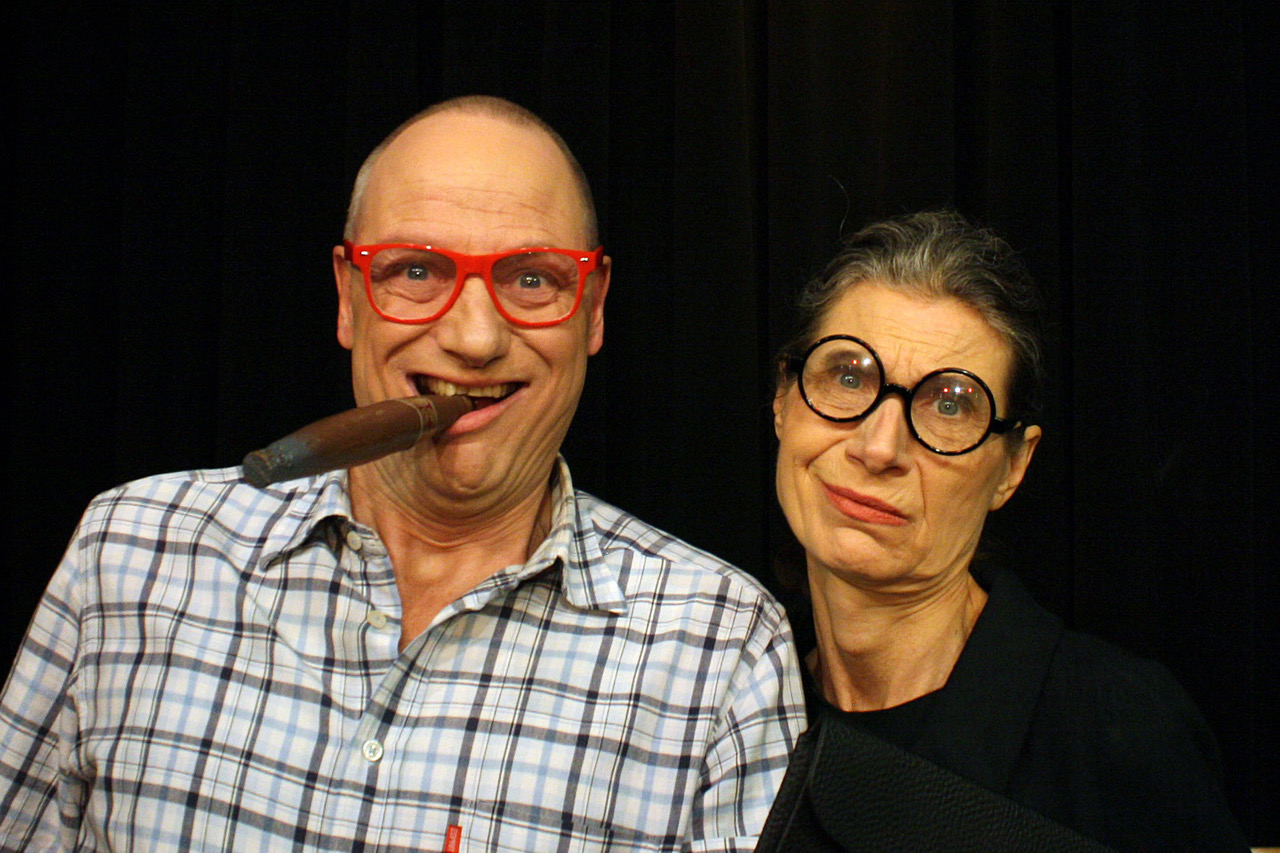 Kabarettduo Kabarett A-Z verkleidet für ihr Kabarettprogramm Vorsicht, bissiger Vermieter!